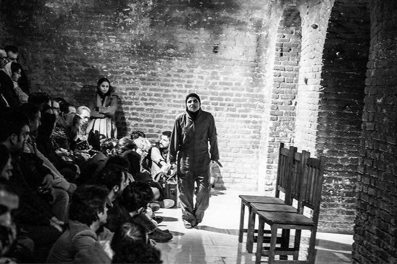 نمایش کاسپار - اجرای محسن معینی ۱۳۹۳